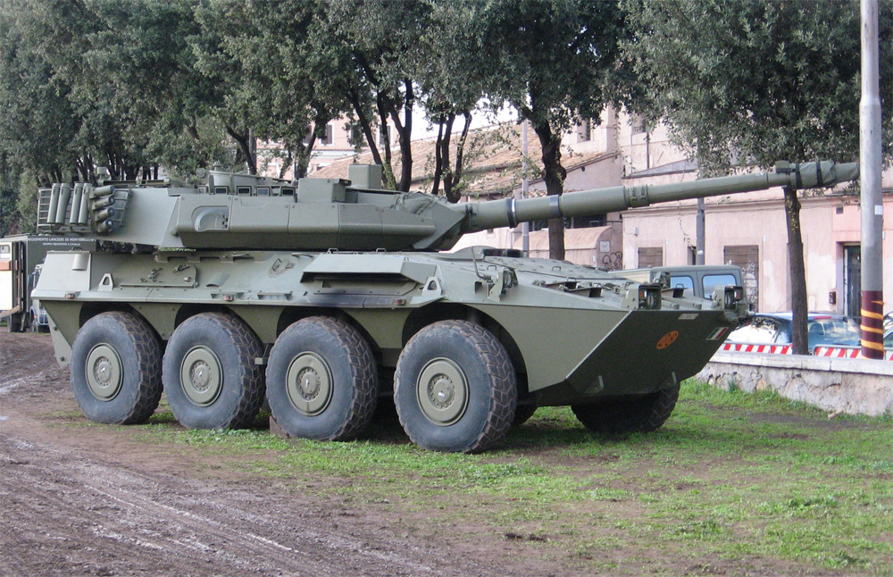 Blindo Centauro dell'Esercito Italiano, fotografato in occasione della Festa delle Forze Armate. L'esemplare era in esposizione pubblica al circo Massimo (Roma).